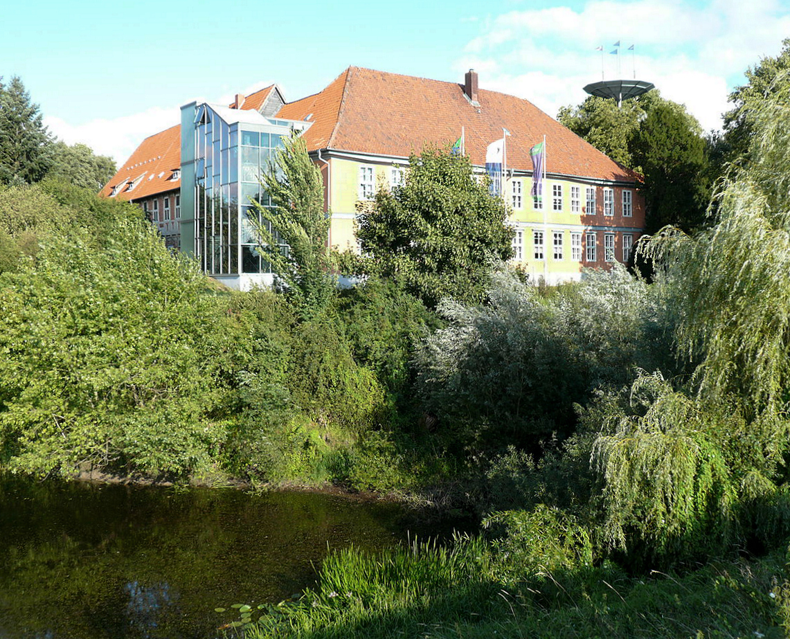 Elbschloss Bleckede mit Graben.